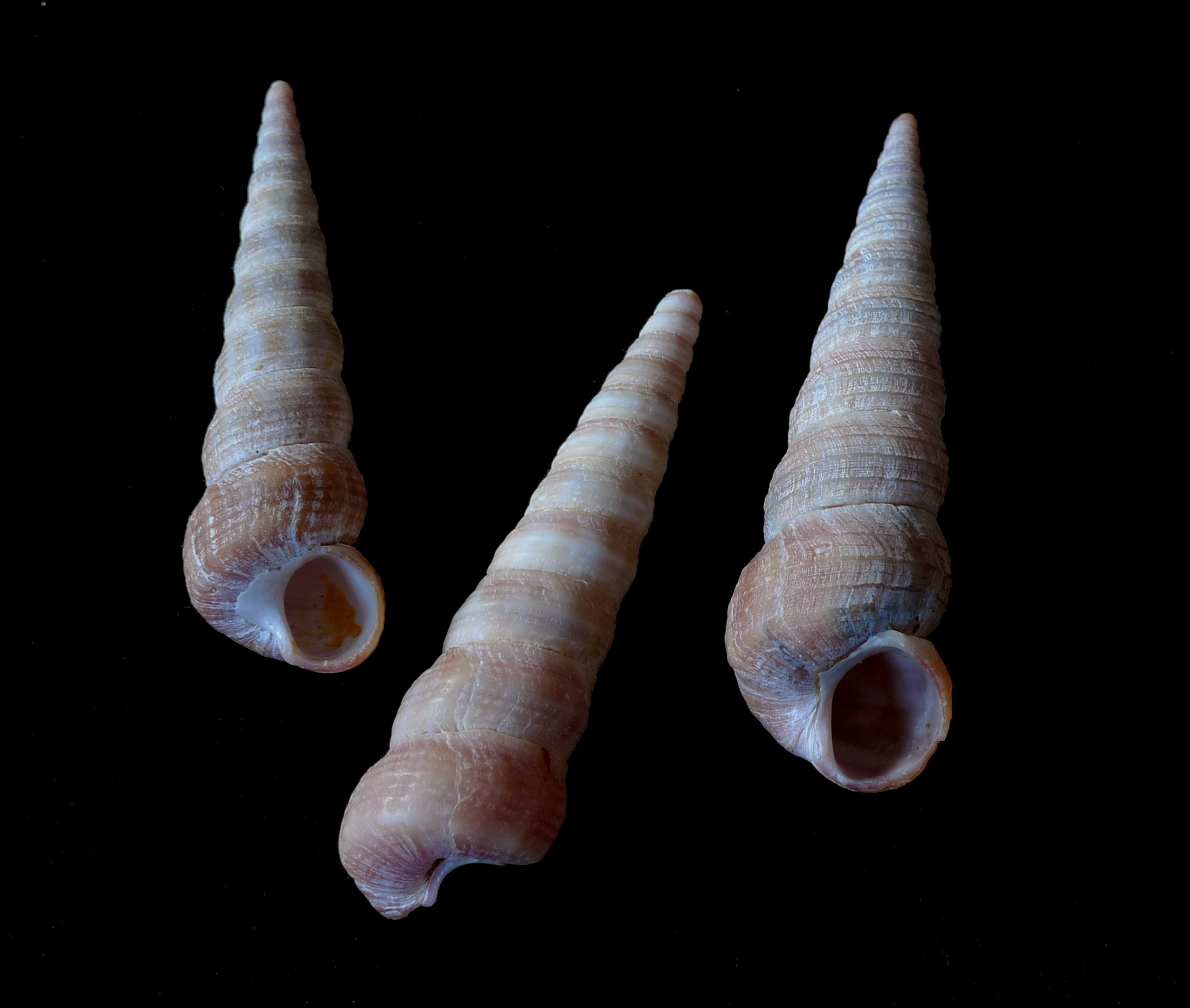 Turritella communis - Turmschnecke; North-Wales/Britain